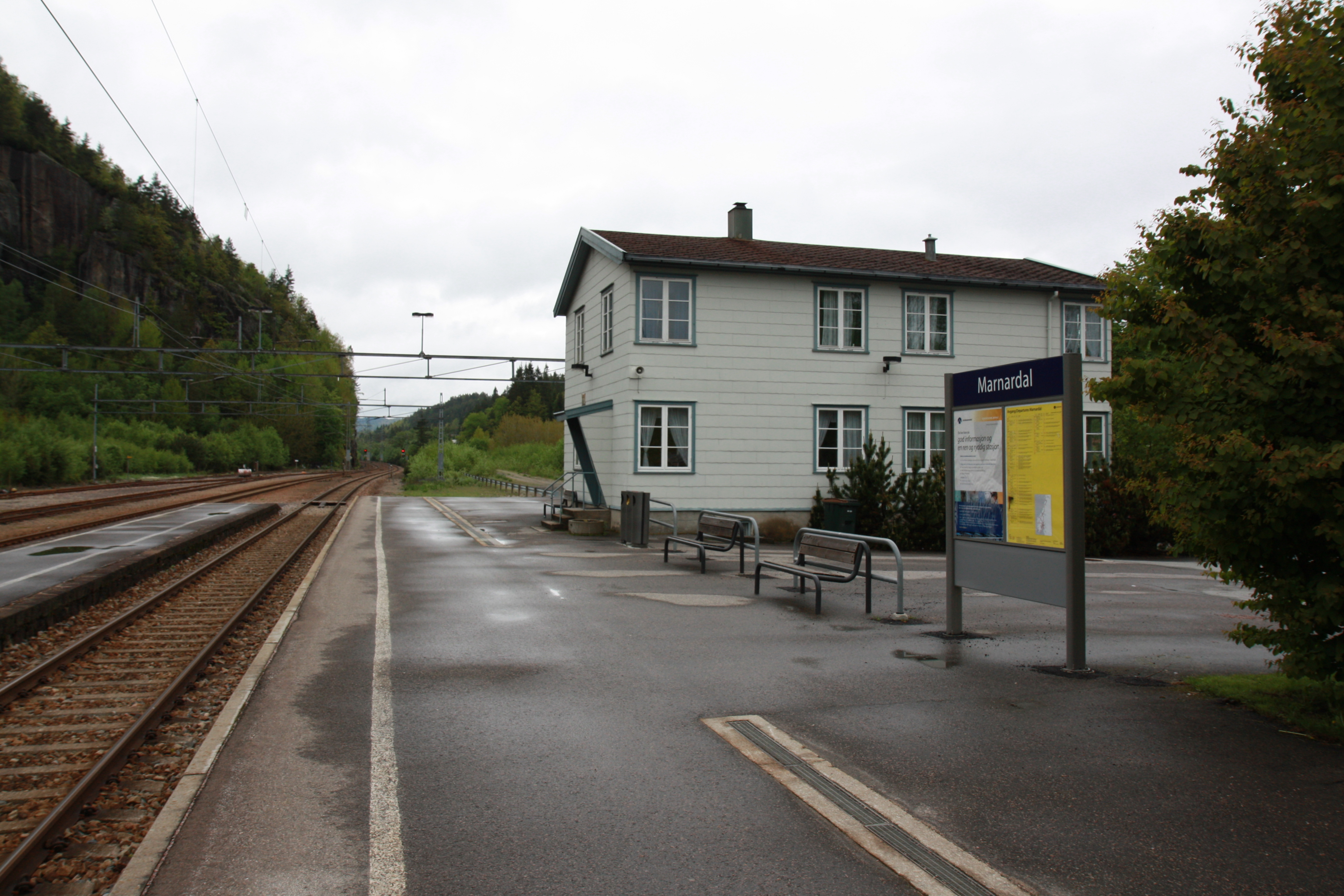 Marnardal stasjon på Sørlandsbanen